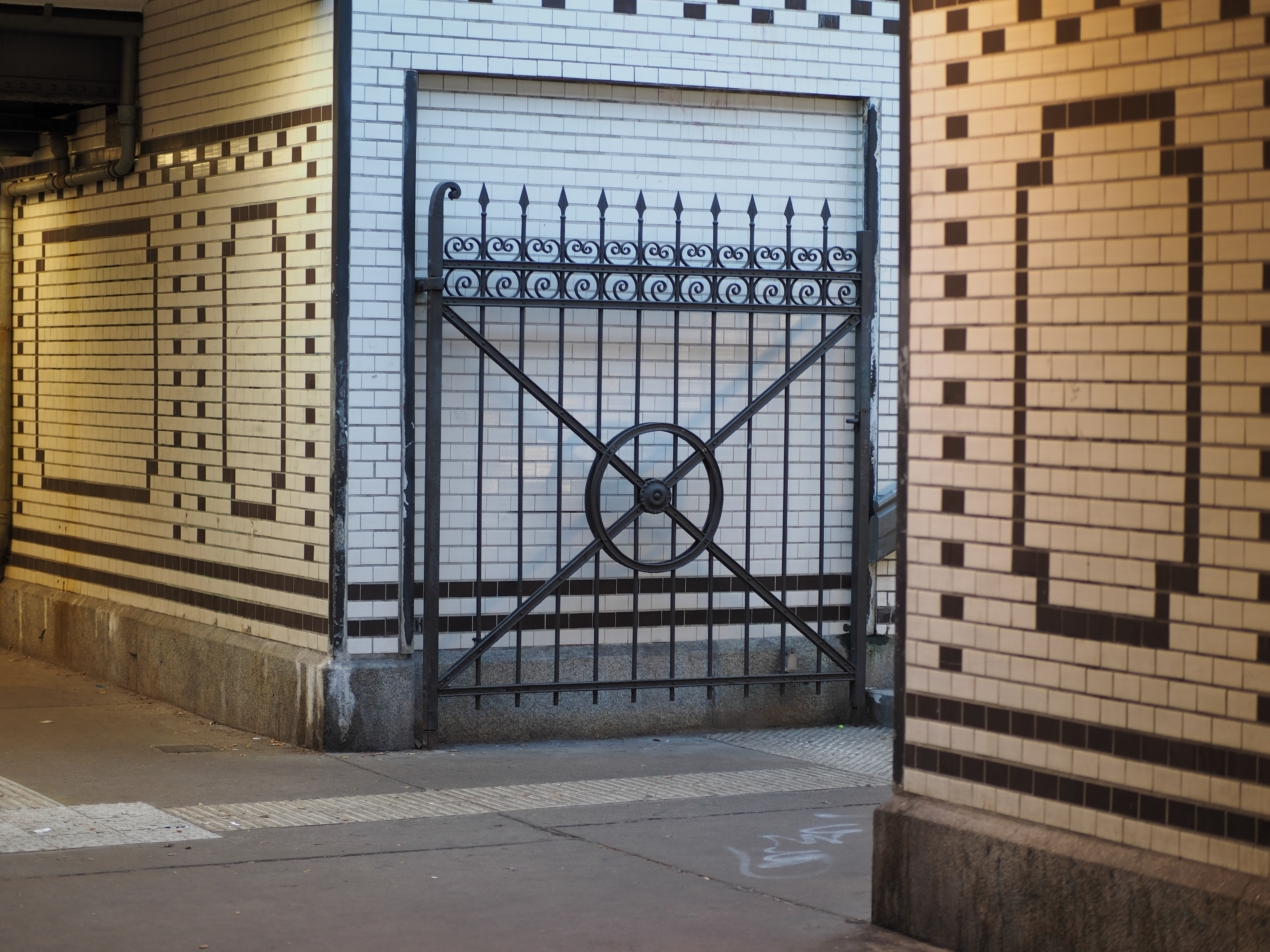 Deitsch: Aufgang zum Bahnsteig im S-Bahnhof Berlin-Friedenau, Denkmalliste 09066378